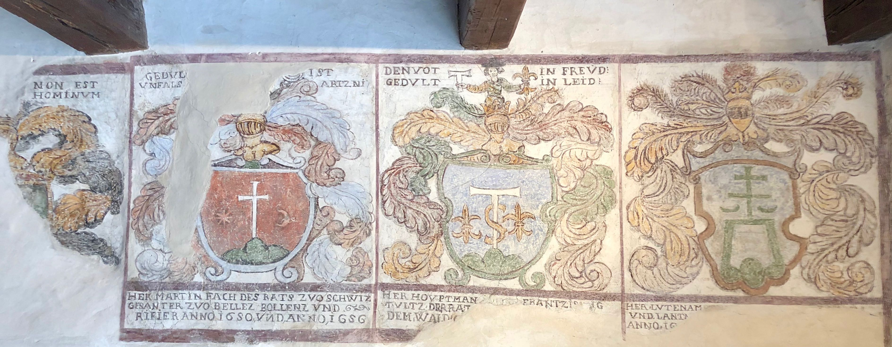 Museo della Valle di Blenio Wappen im Eingangsbereich